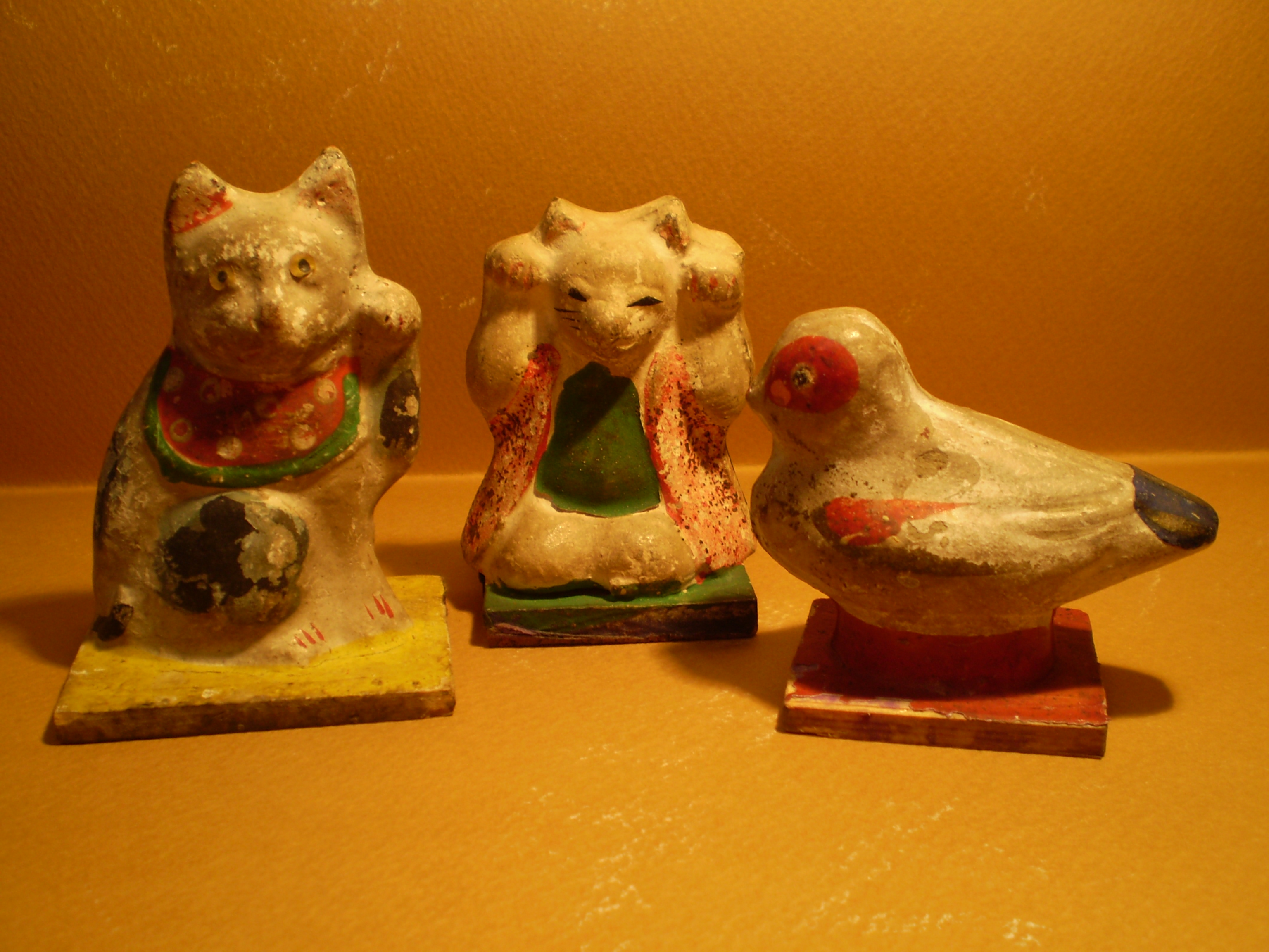 今戸人形「ぴいぴい」（ふいご笛）（明治後期）